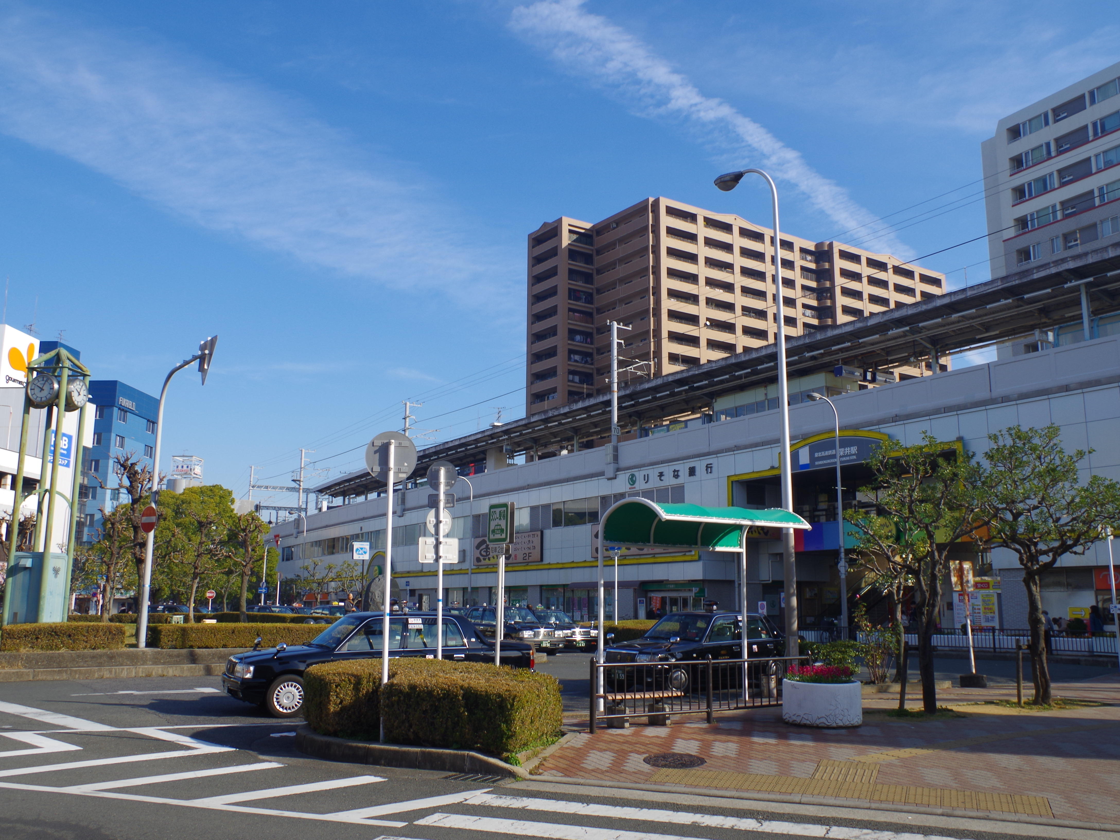 泉北高速鉄道線 深井駅(西口) Fukai station 2012.12.14